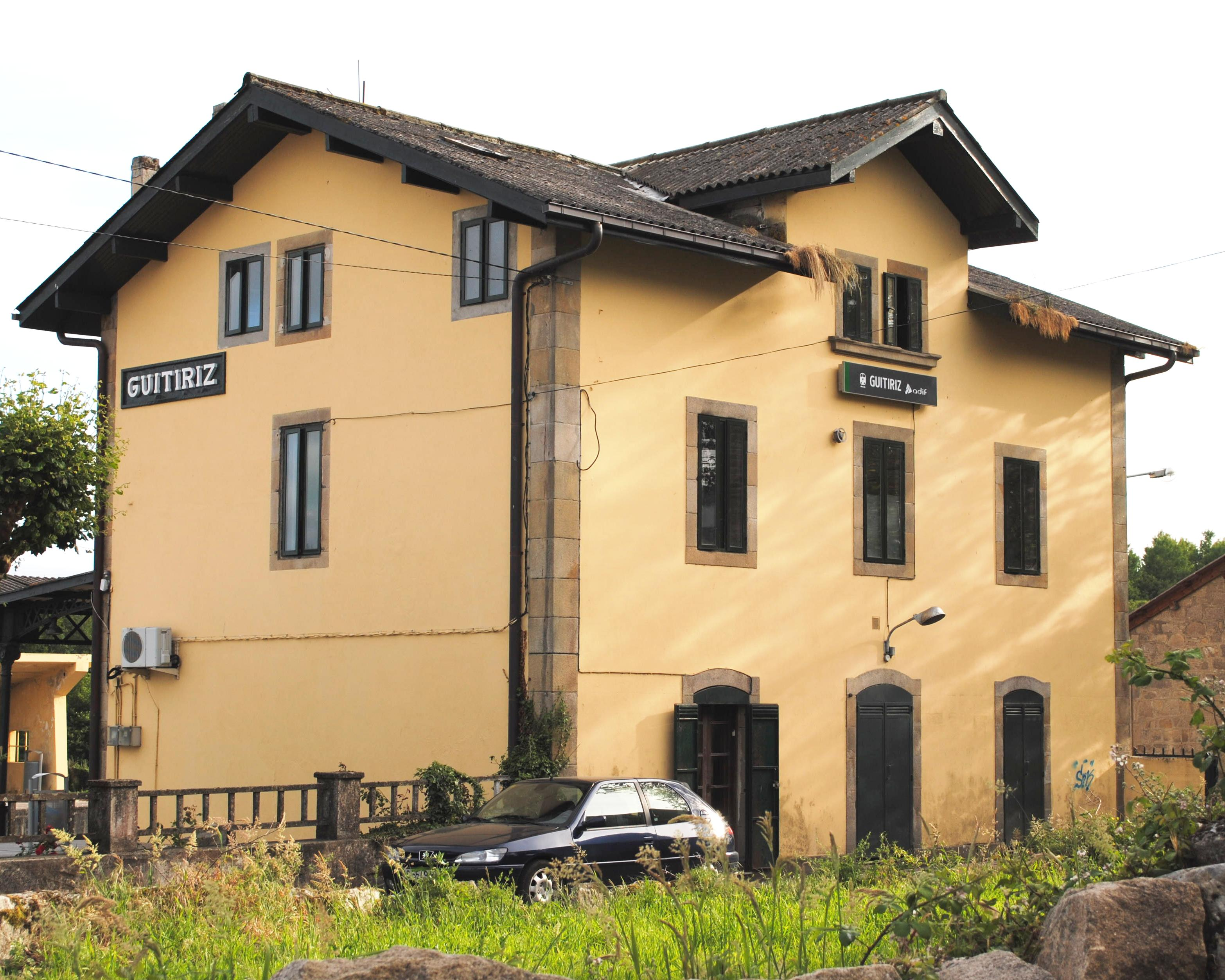 Estación de Guitiriz Guitiriz (Provincia de Lugo).